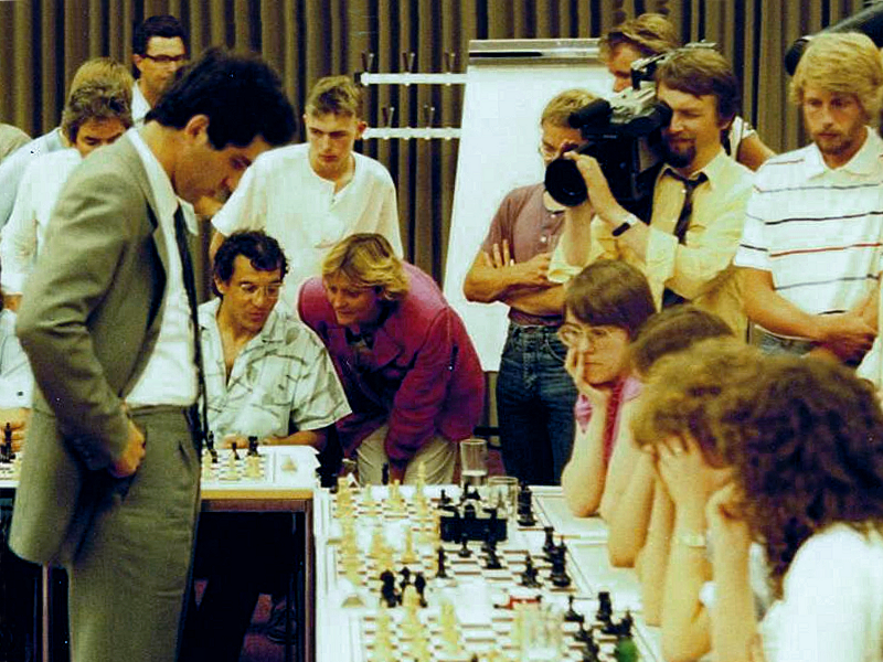 Garry Kasparov spielt simultan gegen Felix Magath und andere Prominente, eine Veranstaltung der Zeitschrift Spiegel im Juni 1985 in Hamburg. Rechts die vier Schwestern Susanne, Barbara, Isabel und Dorothee Hund.